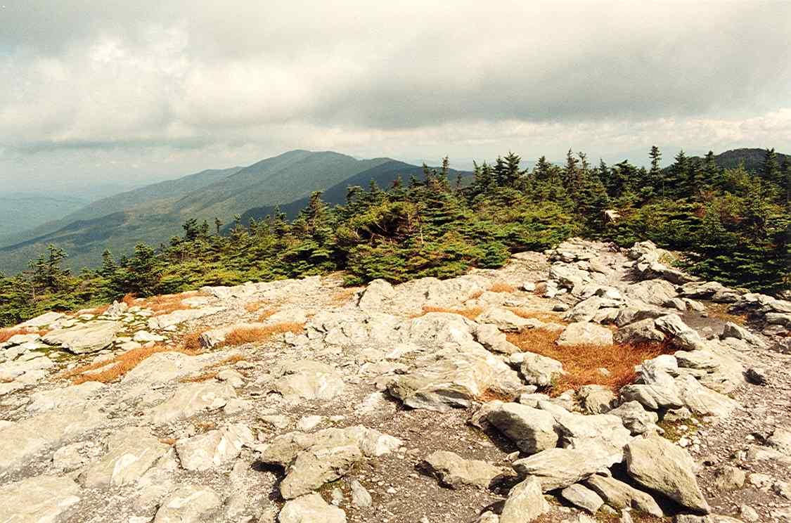 Mt. Ellen seen from Mt. Abraham, Vermont